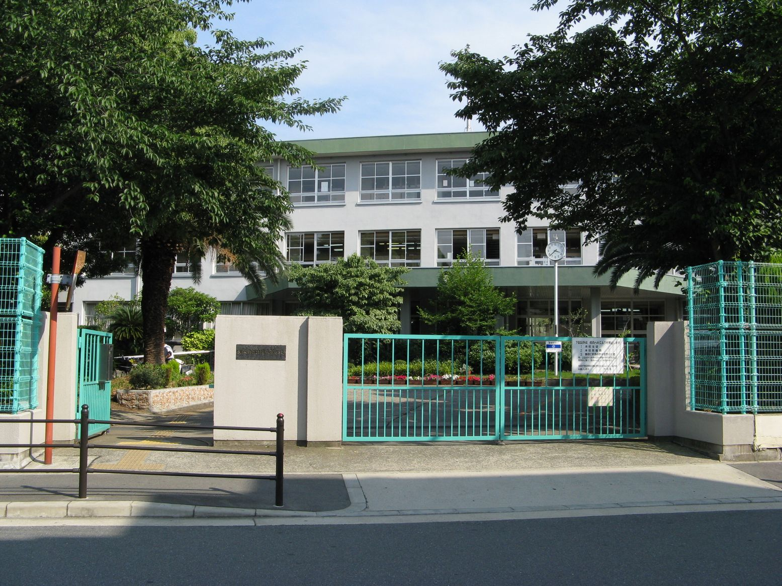 大阪府立北淀高等学校